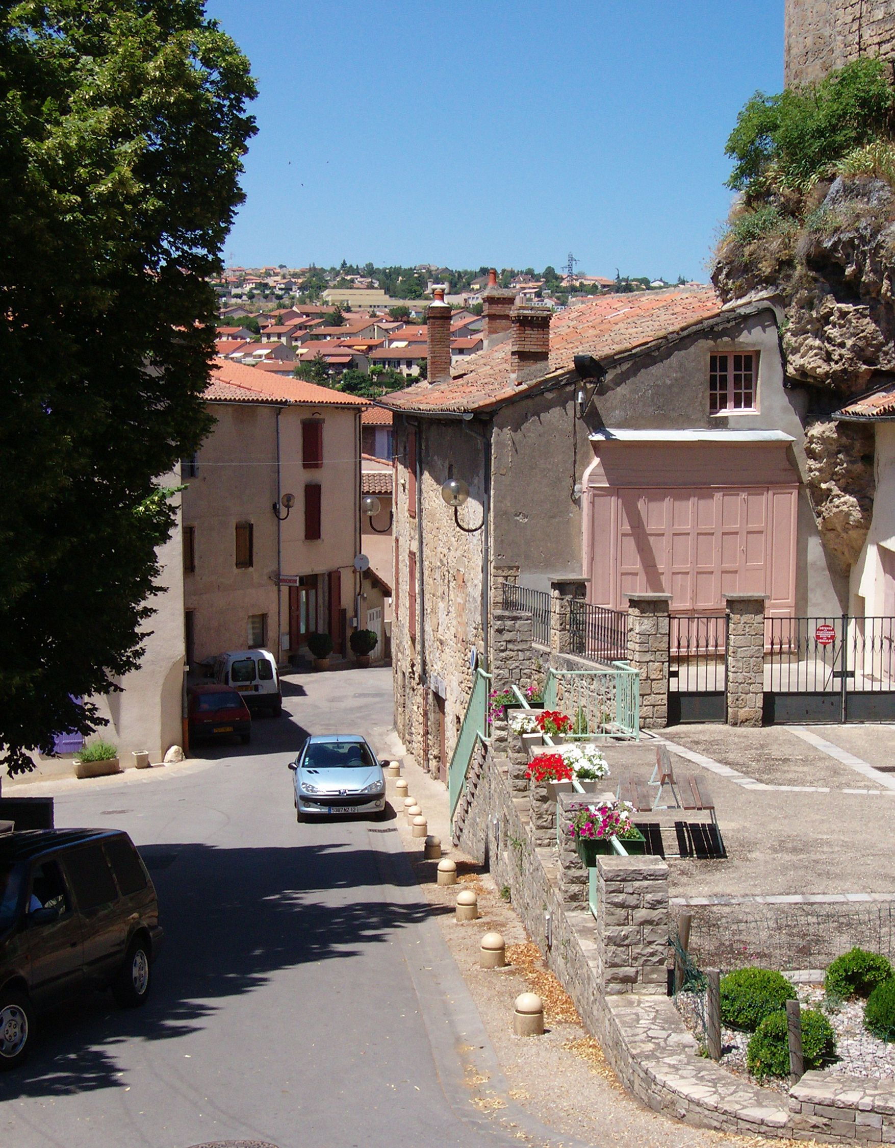 Creissels, view to Millau